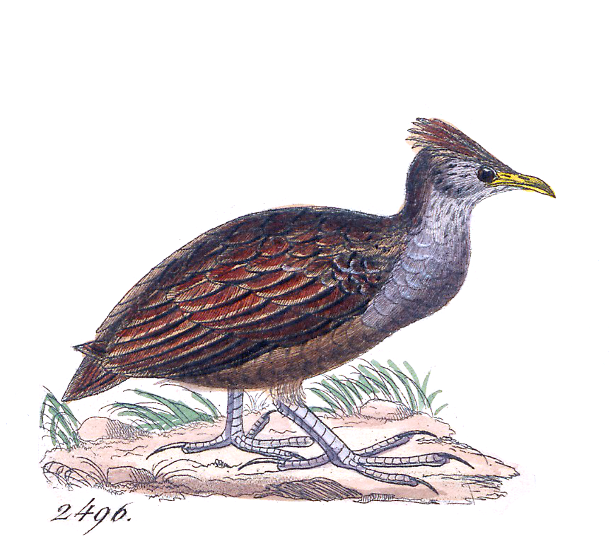 Megapodius forsteni